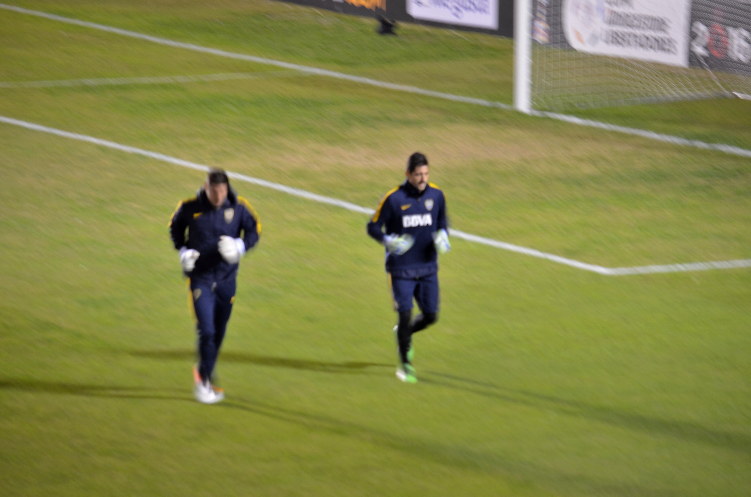 Imagen del partido disputado entre Nacional y Boca Juniors, en el estadio Gran Parque Central, por los cuartos de final de la Copa Libertadores 2016